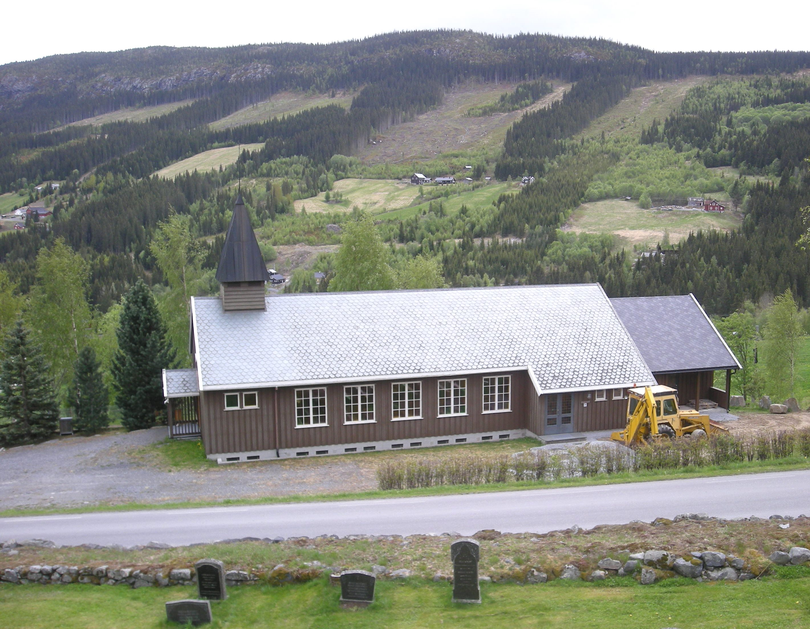 Reinlivegen (fylkesvei 2448, tidl. 221) går mellom Reinli kapell og Reinli stavkirke.